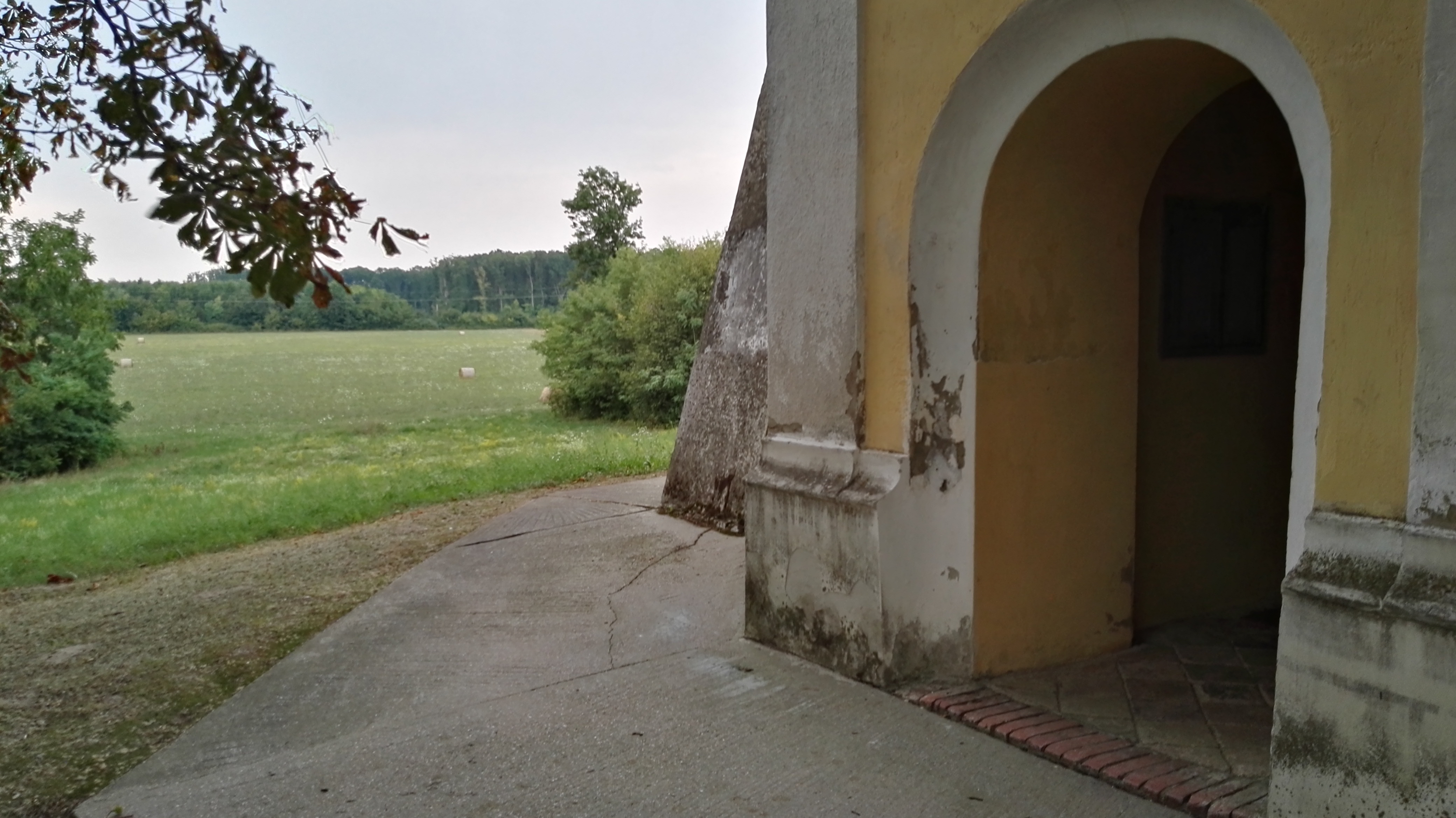 Српски (ћирилица): Ulaz katoličke crkve Novog Sela